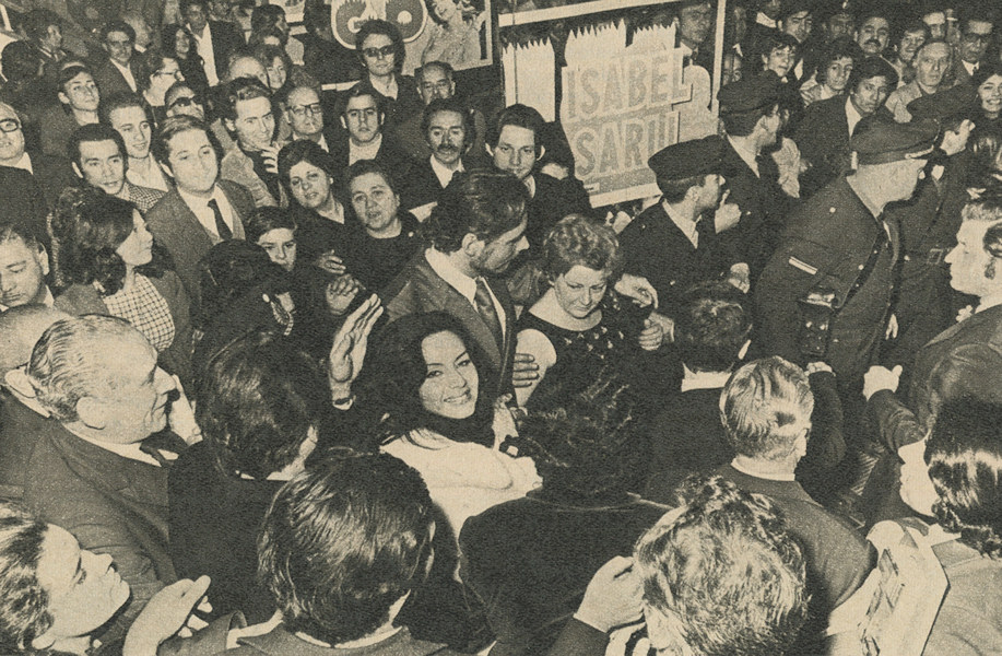 Isabel Sarli (centro) en el estreno de la película Fuego. Revista Siete Días Ilustrados, 4 de octubre de 1971. El epígrafe original dice: Fuego es el ejemplo típico de lo que puede ocurrir cuando se aplica la censura en forma indiscriminada. Es probable que hace dos años el film hubiera pasado inadvertido, pero las autoridades, al prohibirlo en reiteradas oportunidades, crearon una expectativa desorbitada El paternalismo censor pensó que la película "era lesiva para la moral del pueblo" cuando, en realidad, ante su exhibición, considerada tan peligrosa, sólo se escucharon algunas risas en la sala. Esa actitud molestó a Bó: "No entiendo esas risas: mi película habla de un drama real, serio. Mi propósito es demostrar que el amor nunca muere".